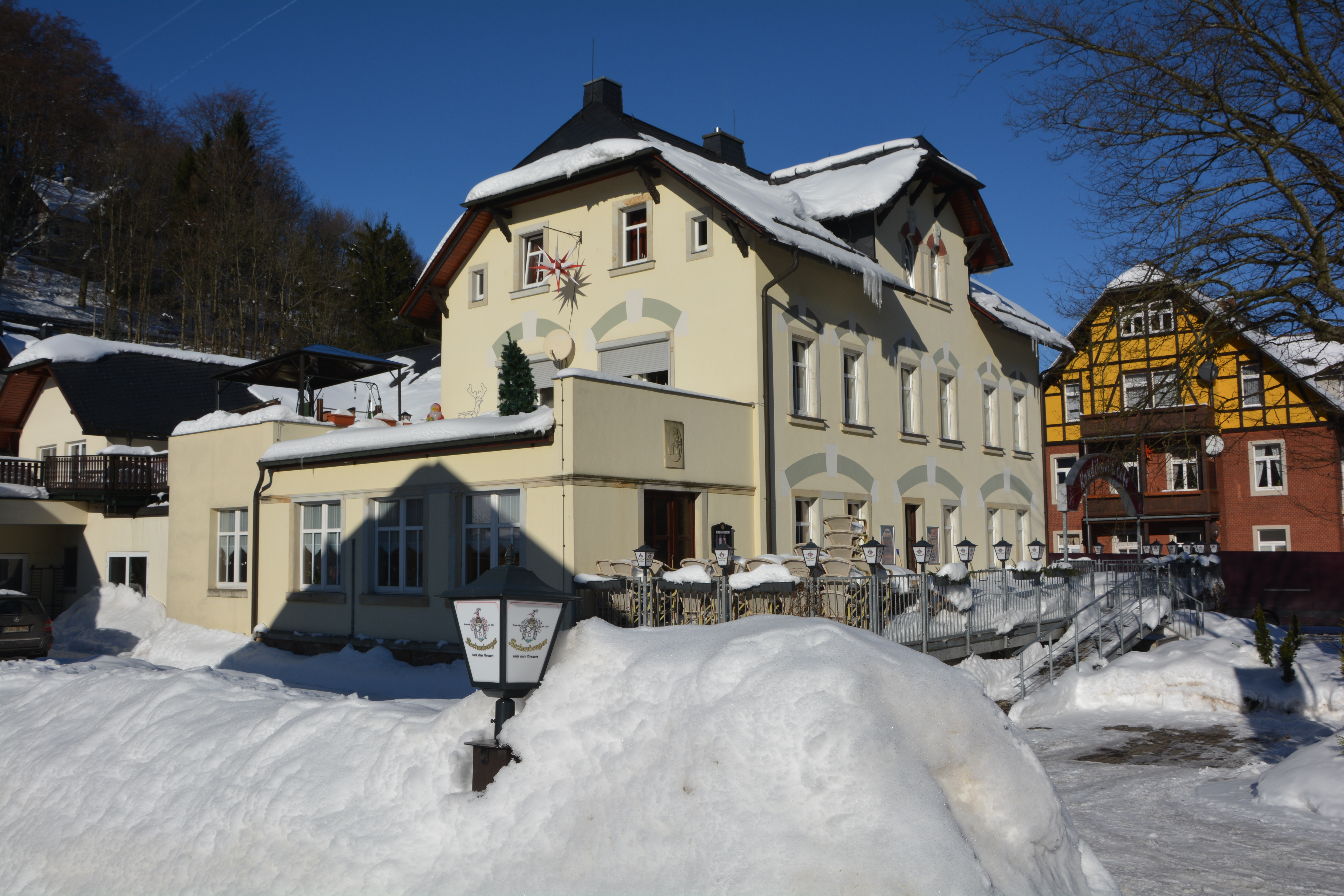 Kurort Kipsdorf, Altenberger Straße 17, Cafe Stenzel. 1897 erbaut.